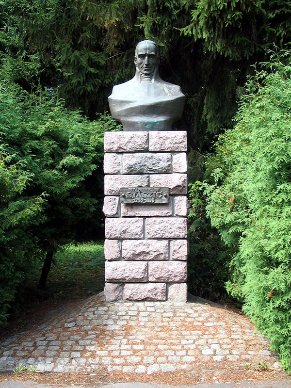 Popiersie Stanisława Staszica w Parku Miejskim w Pile